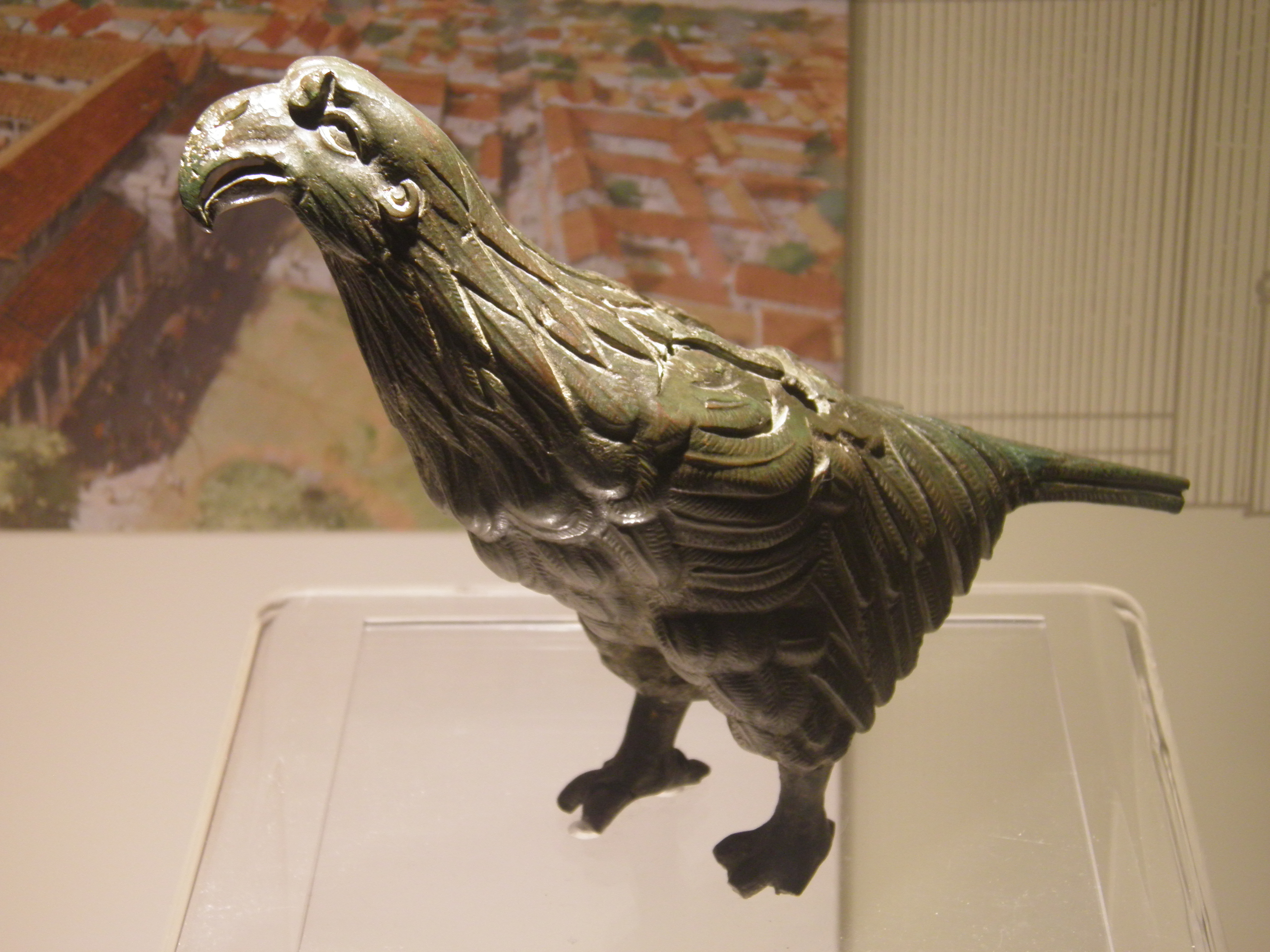 Reading Museum